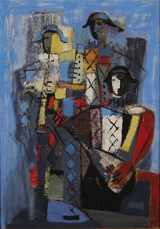 Trois musiciens, Huile sur toile, 90 x 63 cm